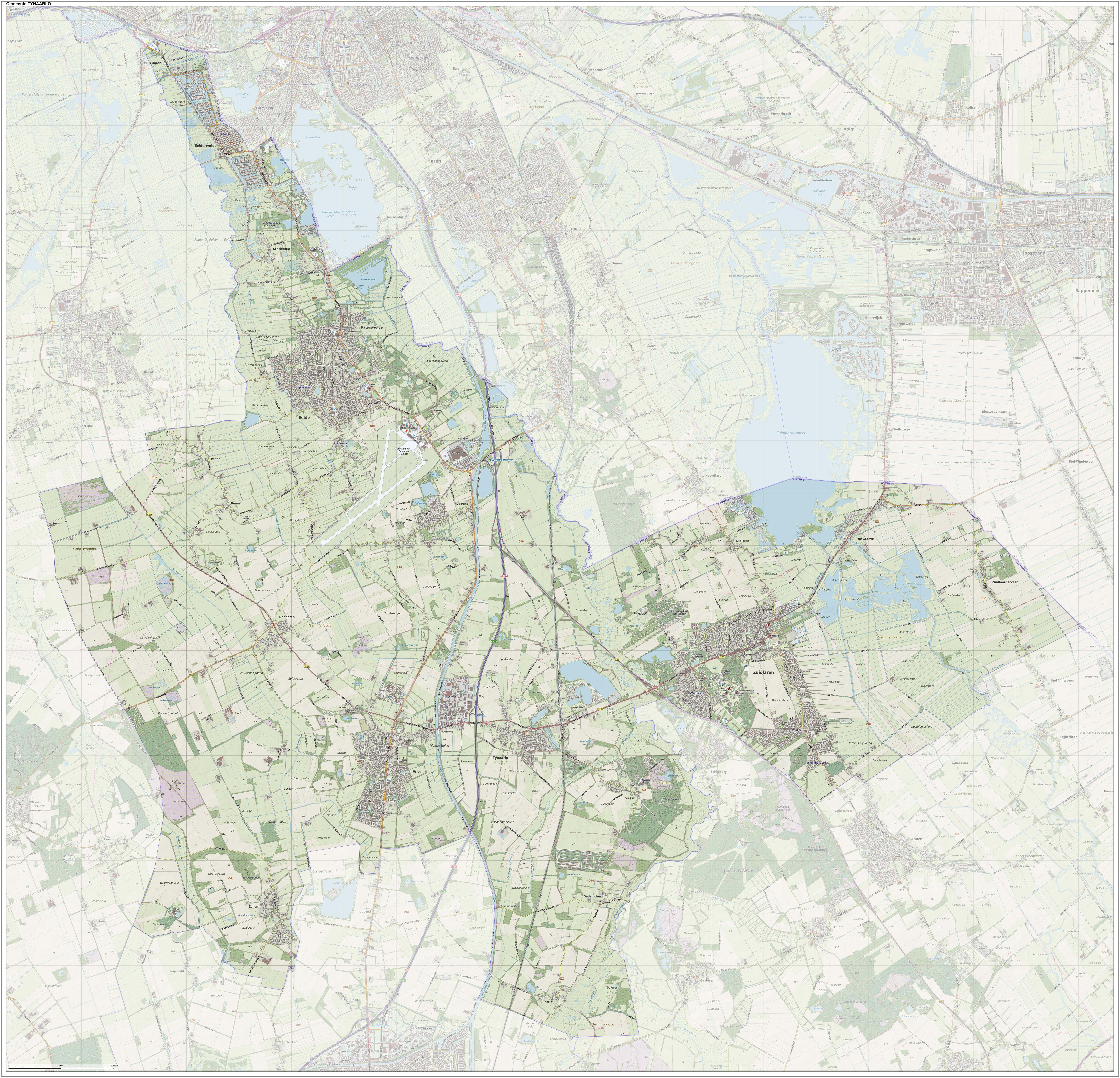 Topografische gemeentekaart. Resolutie: 400 pixels/km. Kaartbeeld samengesteld uit de open geodata van de Top10NL en Top25namen (Kadaster), Creative Commons-BY licentie. Gebouwvlakken uit open geodata BAG extract. Wegen uit de OpenStreetMap, OpenStreetMap community. Reliëfschaduw uit de Actuele Hoogtekaart AHN2. Samenstelling en kleurenschema: Jan-Willem van Aalst, met QGIS. Zie ook de Legenda.